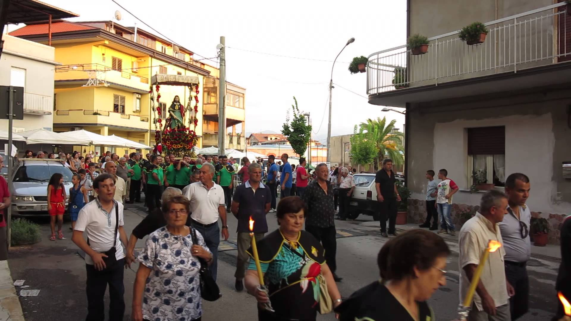 Processione di San Rocco, Melicucco